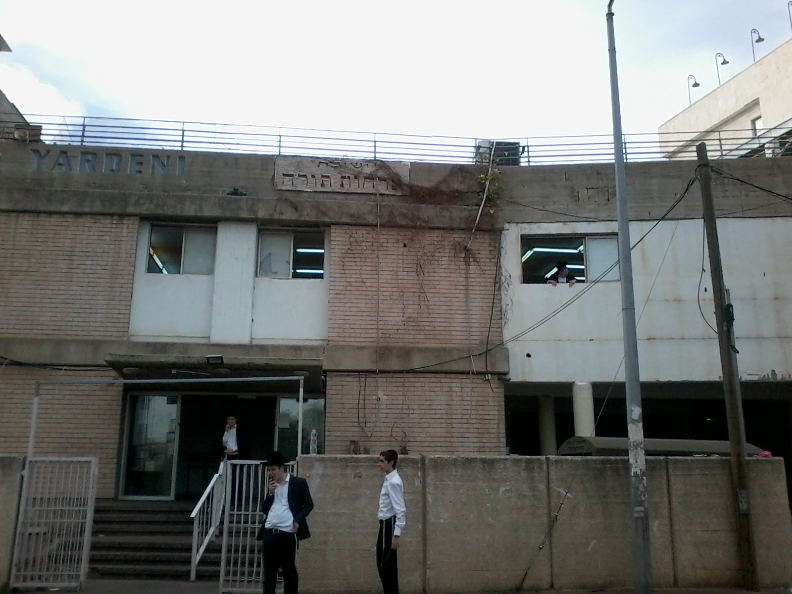 בניין ישיבת אורחות תורה (דצמבר 2017, הלווית הרב שטינמן)